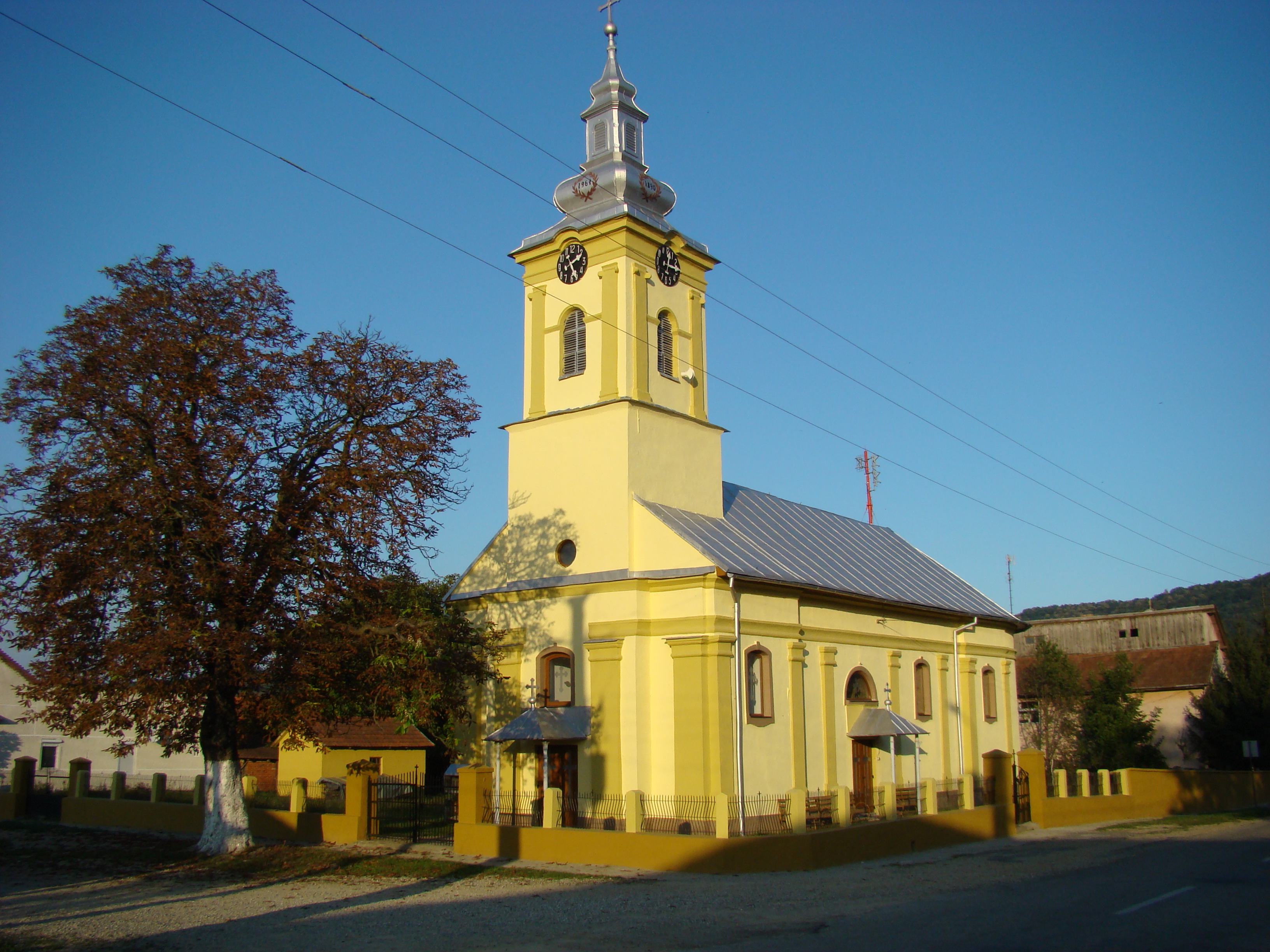 Biserica ortodoxă din Fârdea-Timiș